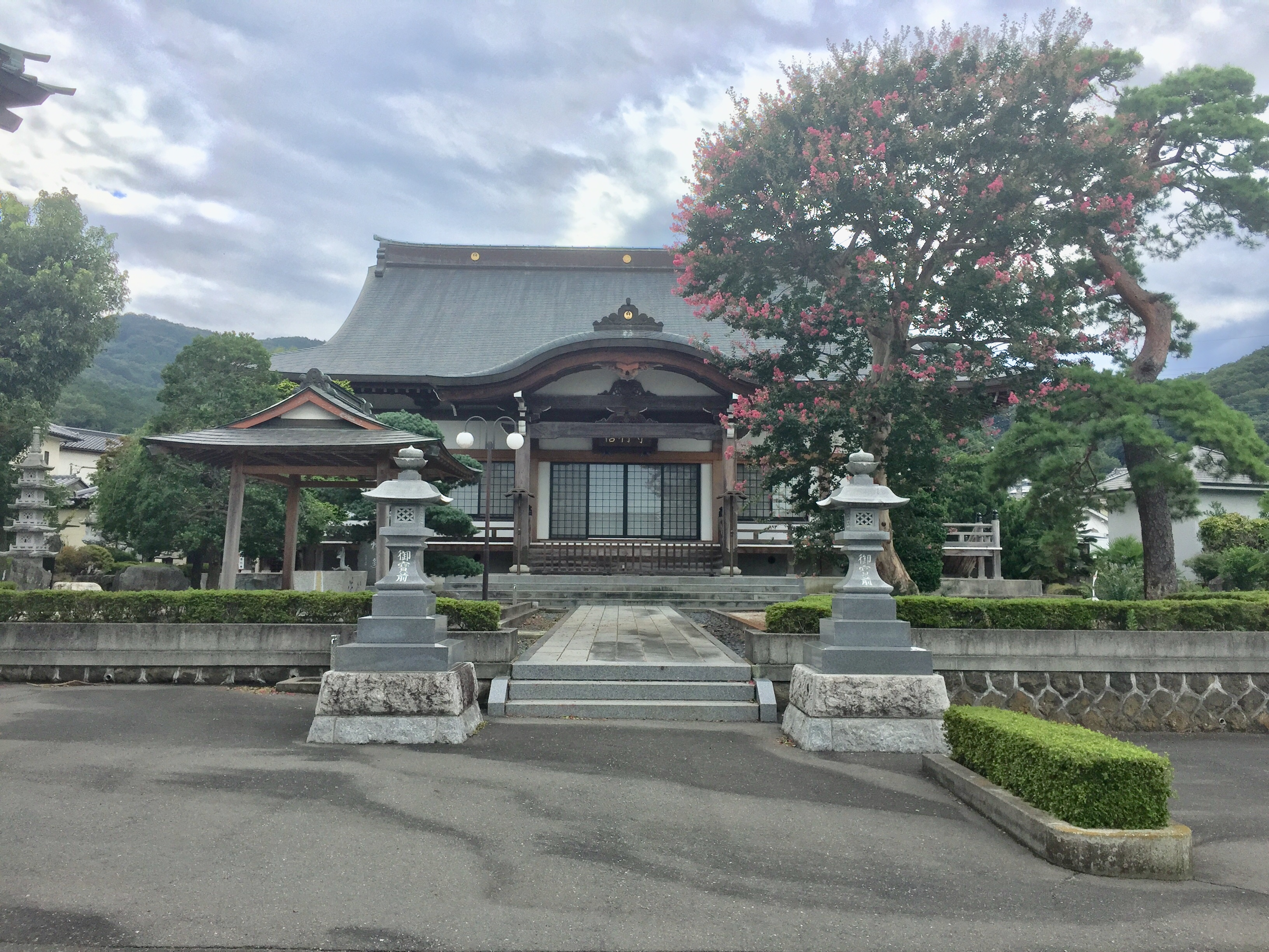 栃木市平井町にある、日蓮正宗法華山信行寺本堂。